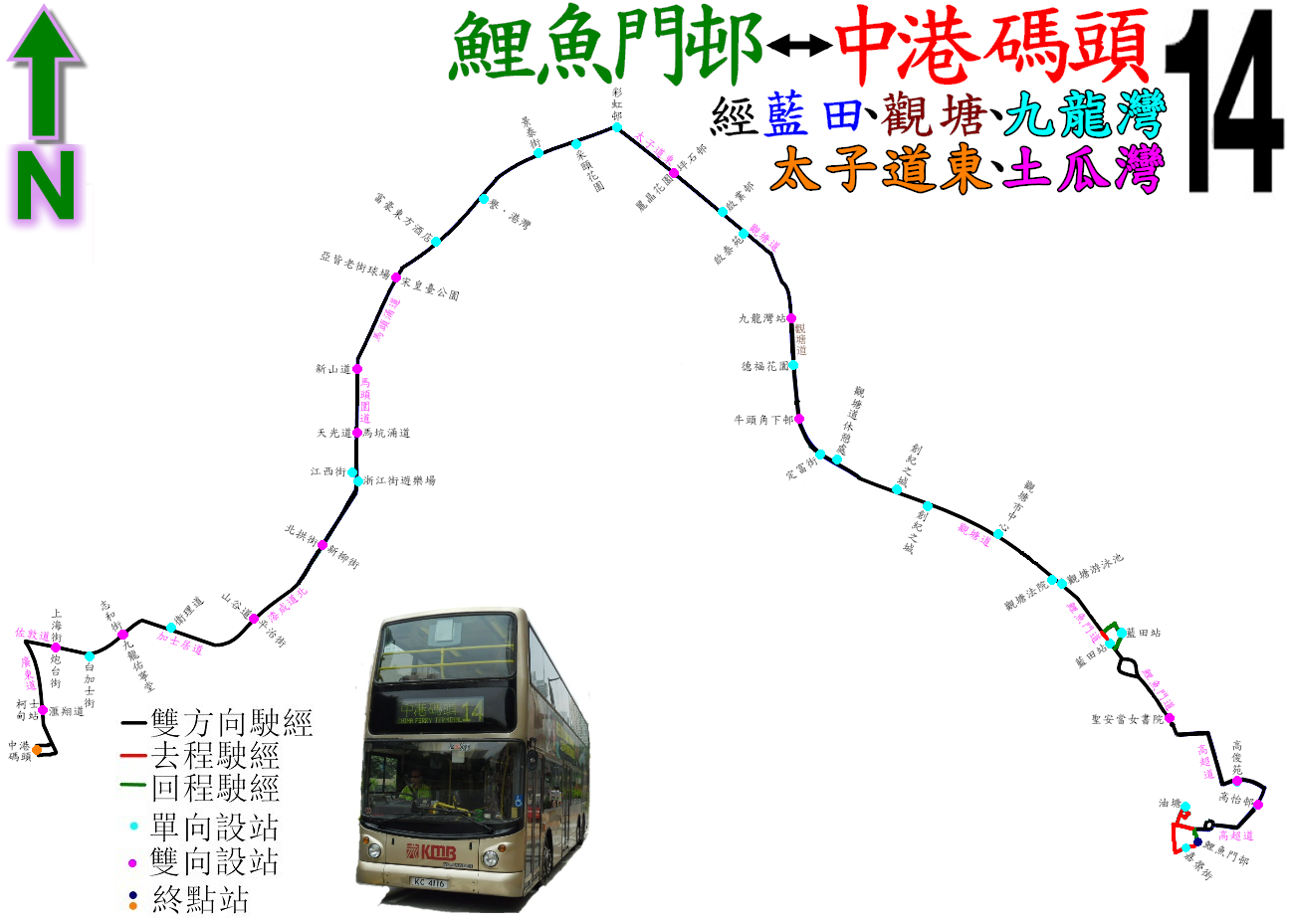 中文（香港）: 九巴14線(獨立)的走線圖